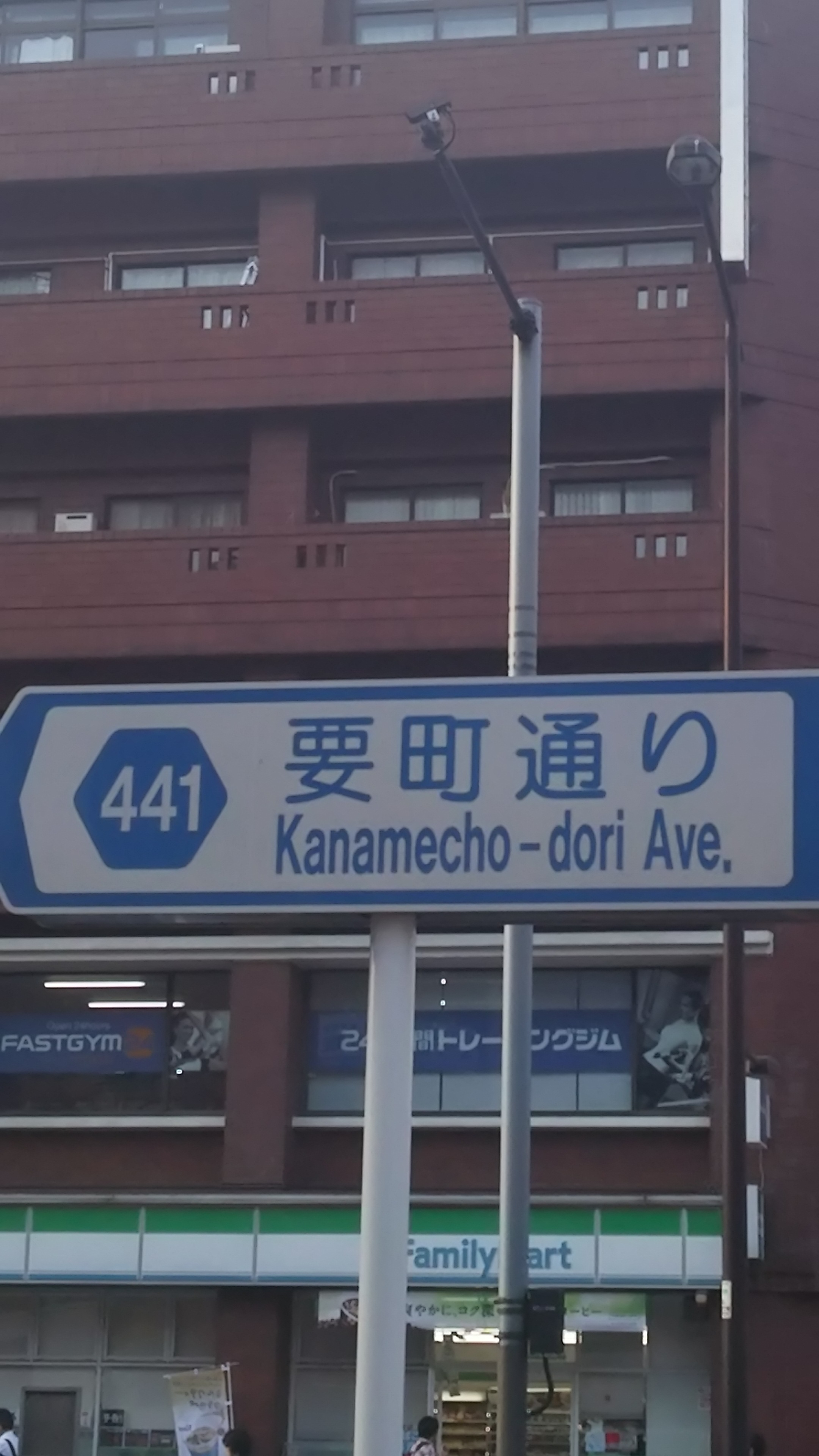 東京都道441号 要町にて